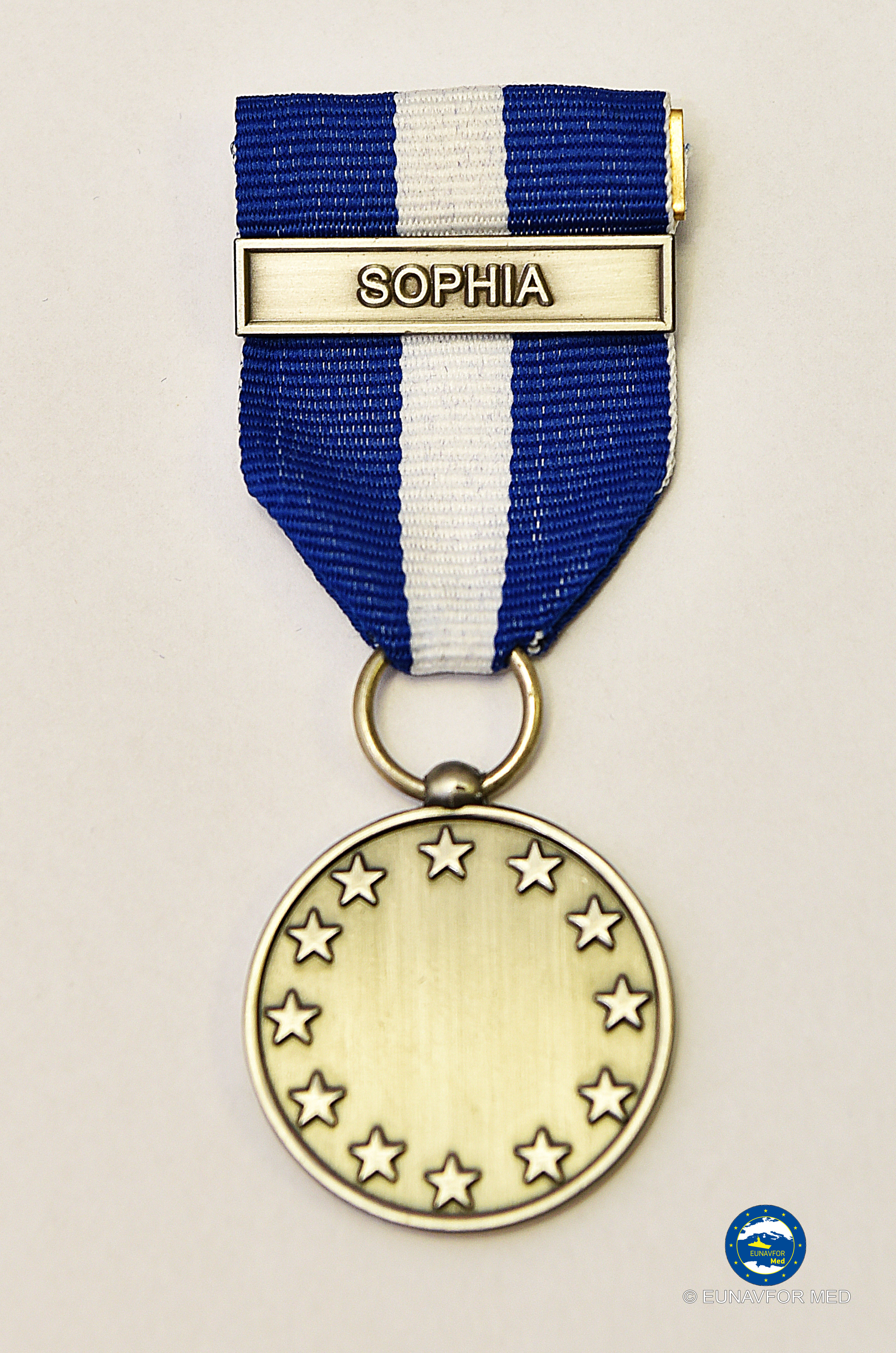 Medali EUNAVFOR MED operasi Sophia